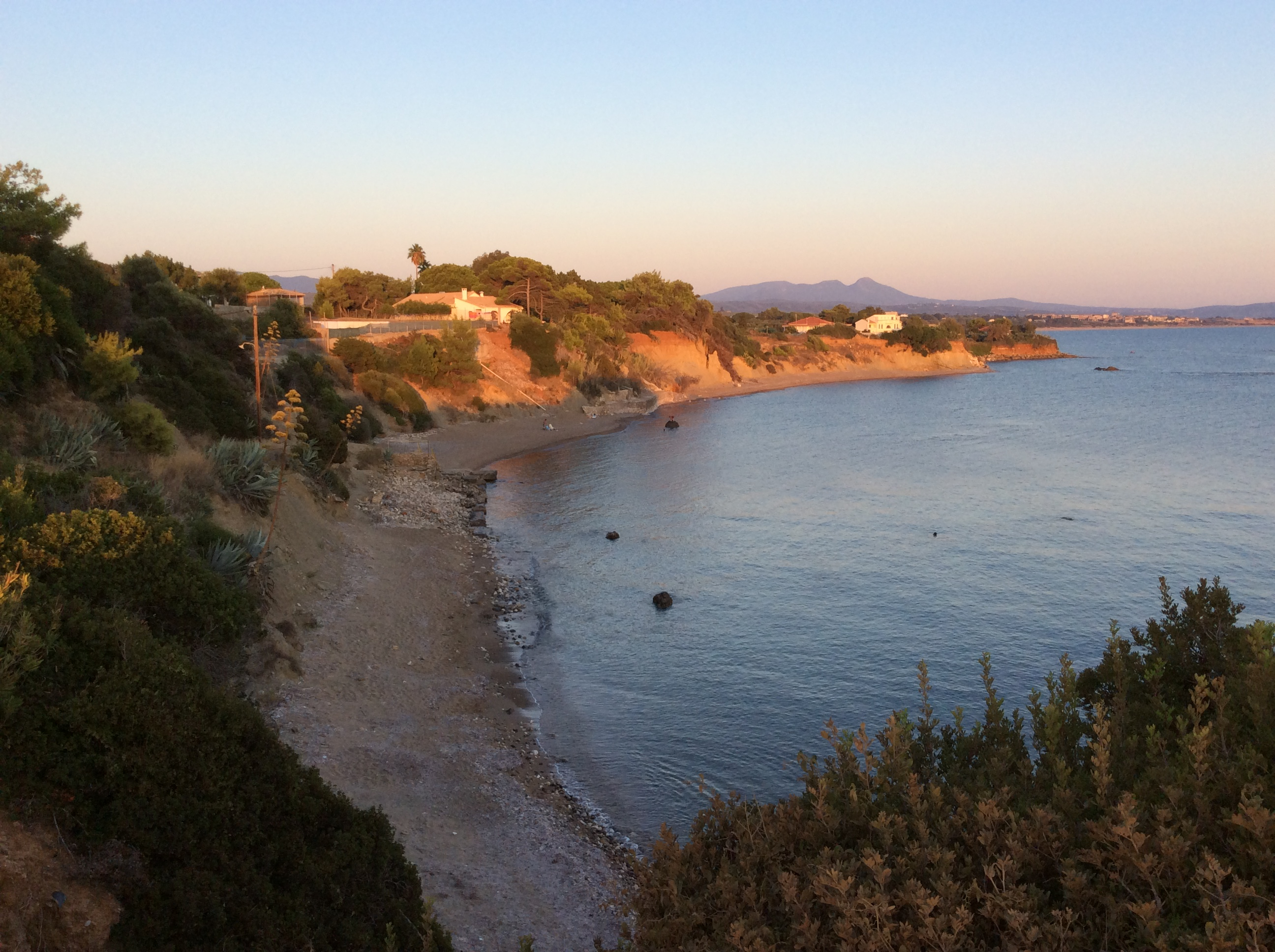 Βρομονέρι Μεσσηνίας. Άποψη της νοτιοανατολικής παραλίας του Βρομονερίου.